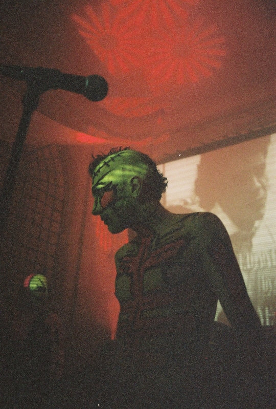 Punish Yourself @ Dark Omen II Festival - Château de Vaux-le-Pénil